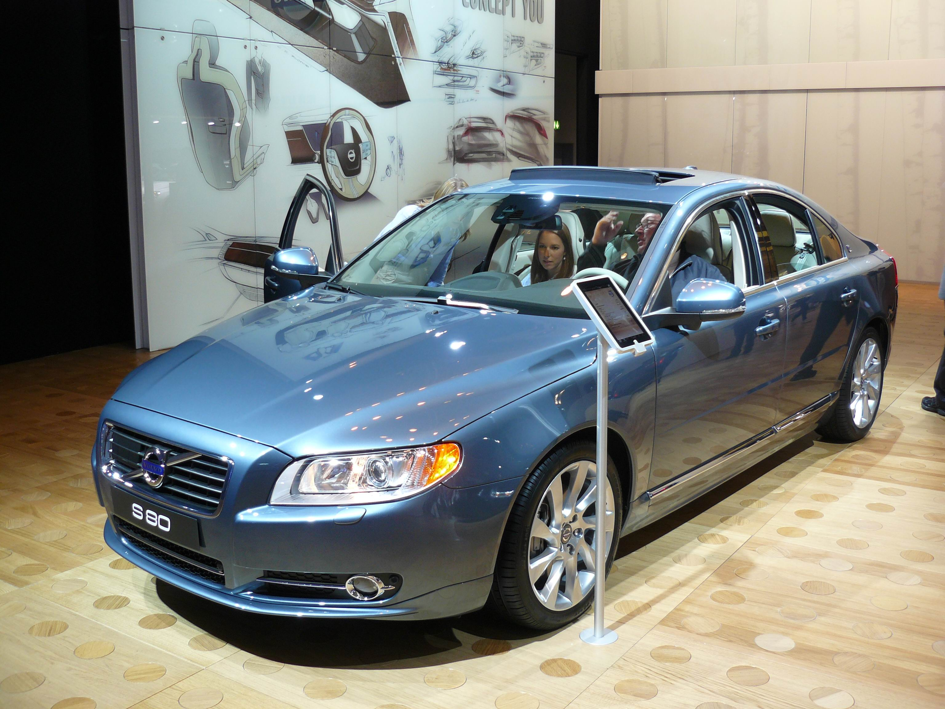 Francfort 2011